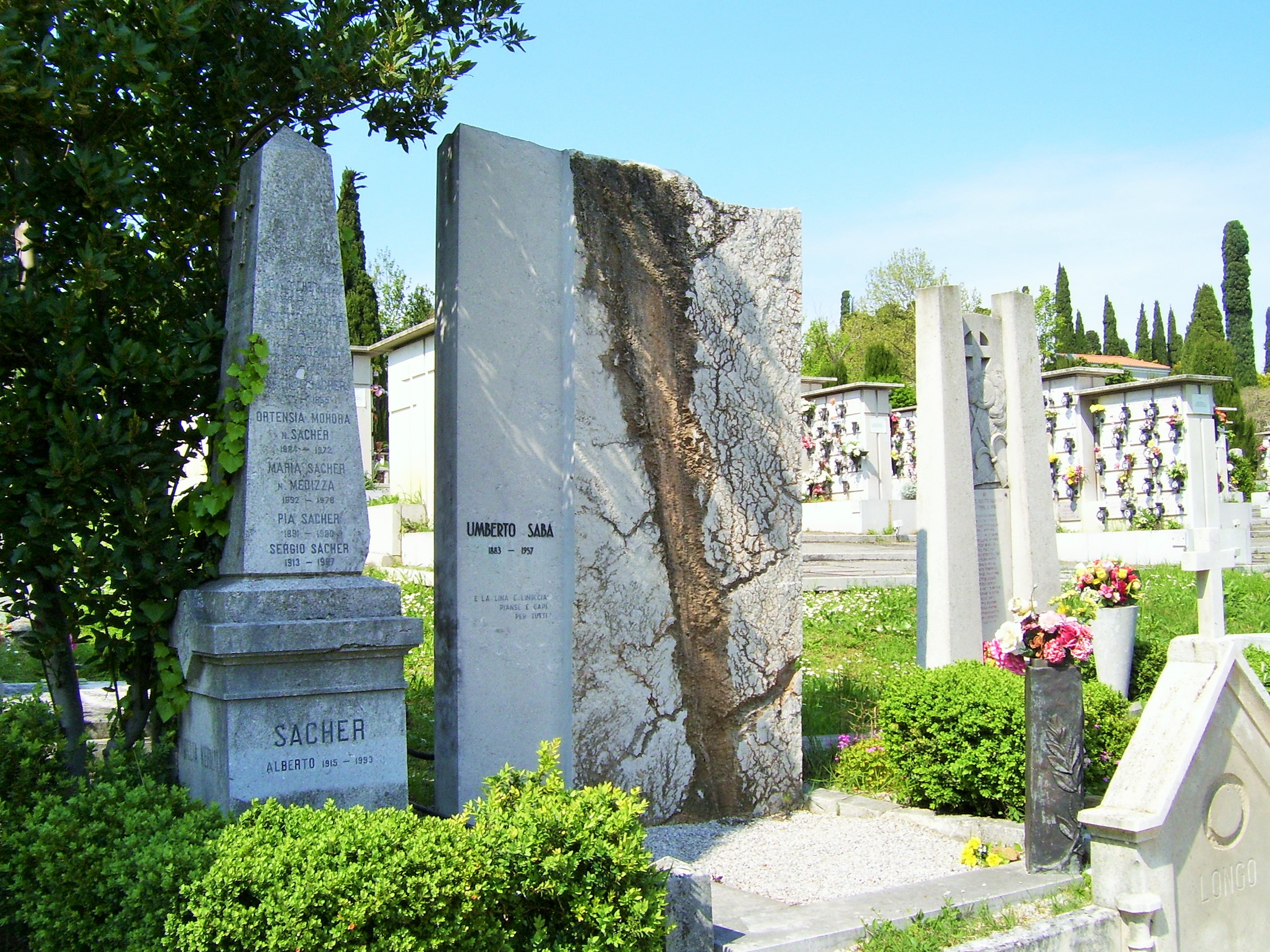 Trieste. Cimitero di Sant'Anna. La tomba di Umberto Saba.